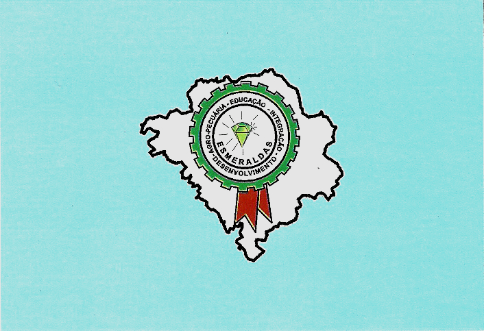 Bandeira da cidade de Esmeraldas, Minas Gerais.